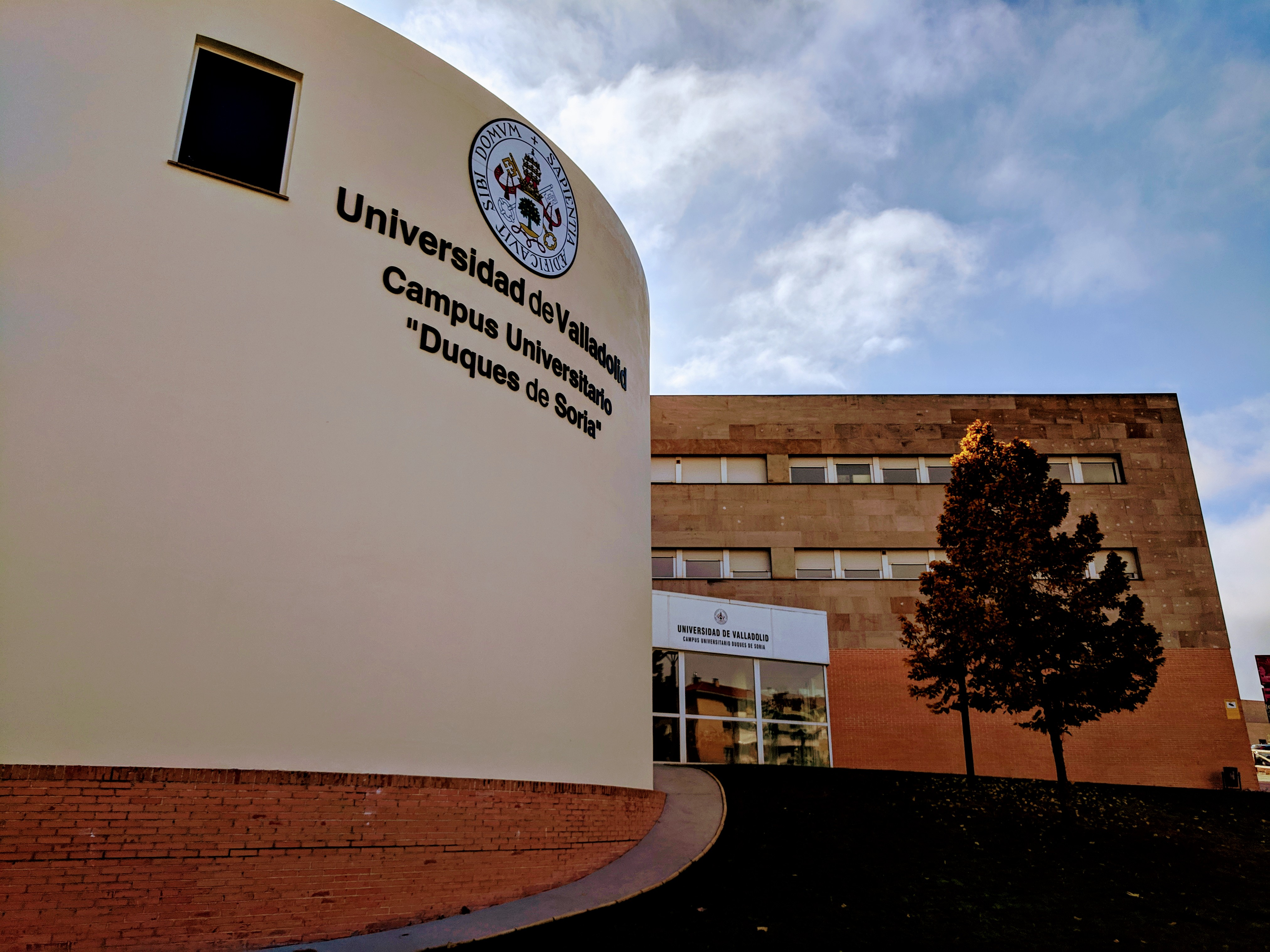 Entrada al campus universitario de Soria, adscrito a la Universidad de Valladolid.